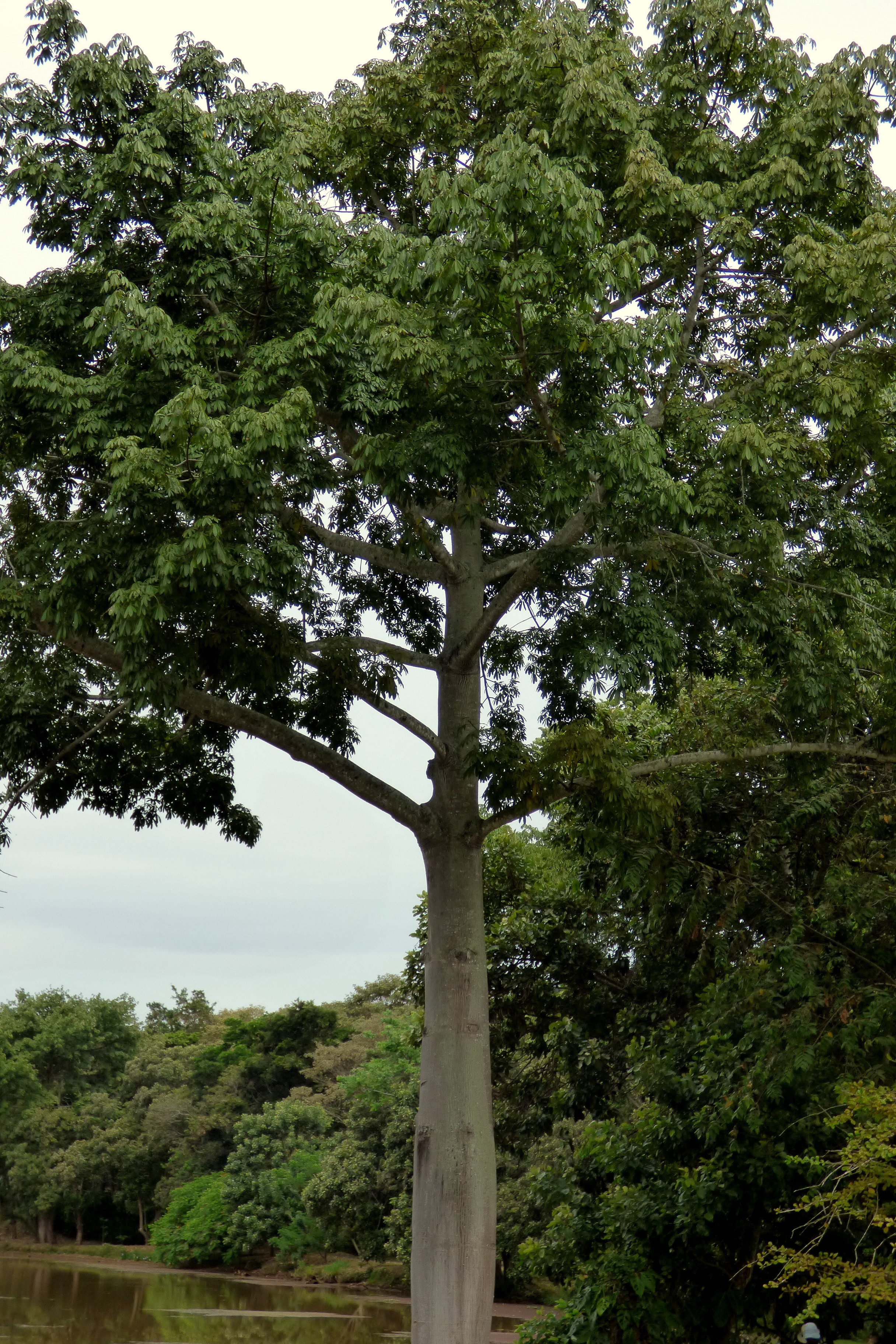 Ceiba (Ceiba pentandra)